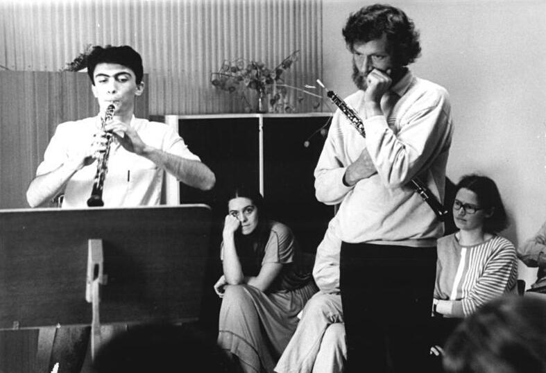 Weimar, Teilnehmer des 27. Internationalen Musikseminars ADN-ZB Ludwig-15.7.86 Bez. Erfurt: Musikseminar - Rund 500 Teilnehmer aus 21 Ländern und Westberlin zählt das 27. Internationale Musikseminar der DDR an der Hochschule für Musik "Franz Liszt" in Weimar,. Namhafte in- und ausländische Gastprofessoren unterrichten in 15 Meisterkursen in den Fächern Gesang, Violine, Violoncello, Klavier, Querflöte, Oboe,Waldhorn und Trompete. Im Kursus von Prof. Burkhard Glaetzner (r.), National- und Kunstpreisträger der DDR, spielt Evgeni Gunow von der Hochschule für Musik Plovdiv (l.) auf der Oboe. -Siehe auch Motiv 1986-0715-32 N